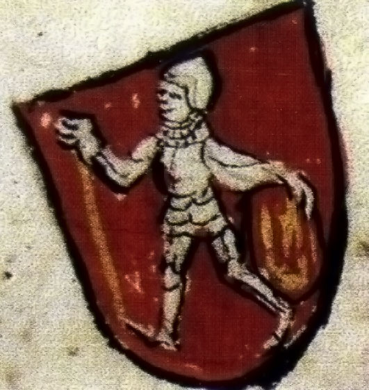 Беларуская (тарашкевіца): Герб Троцкага княства